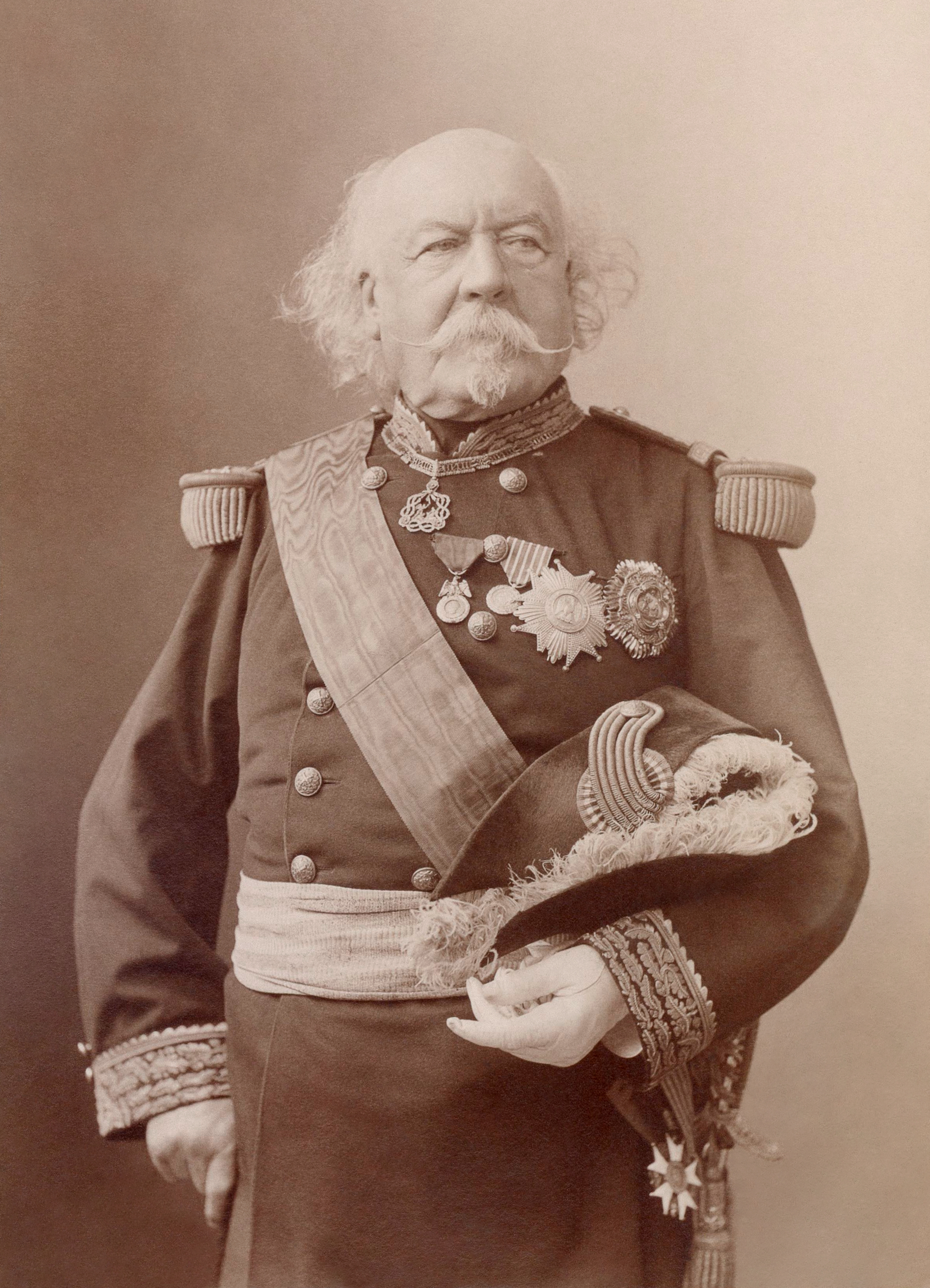 Maréchal Canrobert (François Certain de Canrobert), by Nadar. Albumen print, 14,5 x 10,5 cm